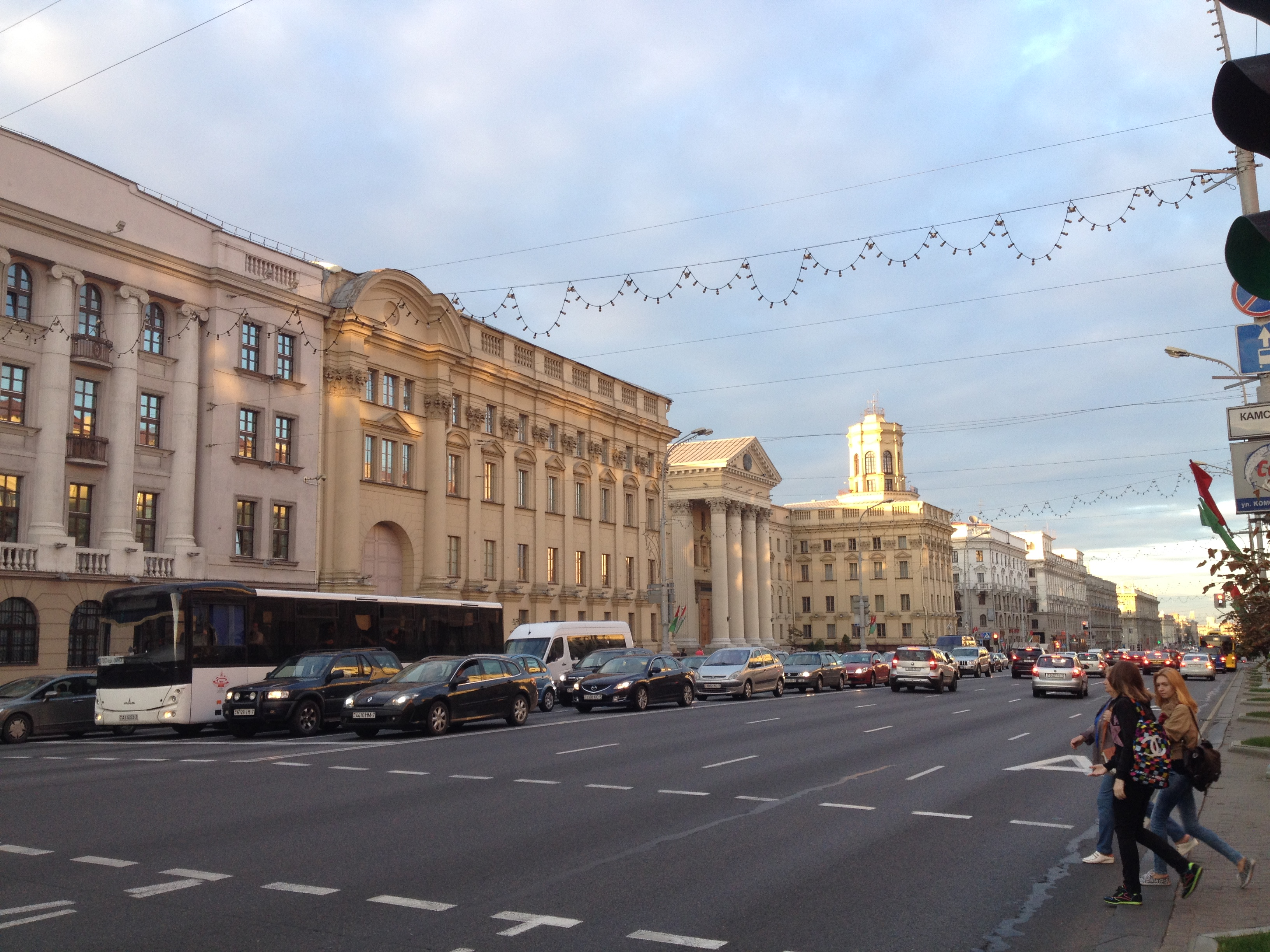 Siedziba Komitetu Bezpieczeństwa Publicznego w Mińsku